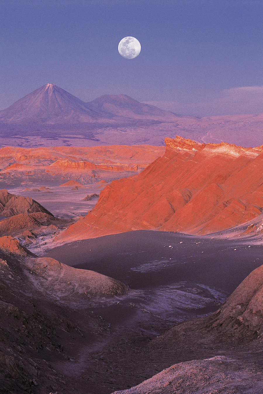 desierto de atacama